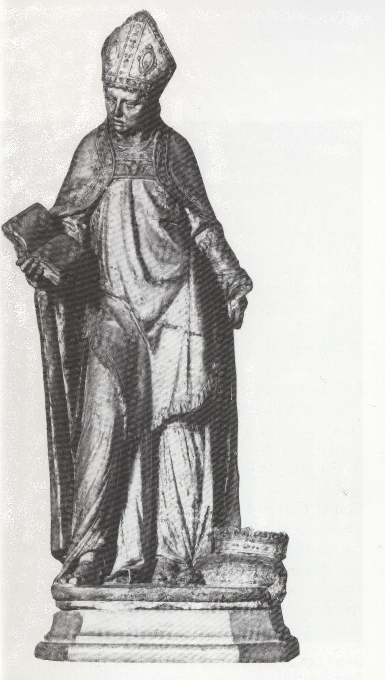 Statue de Saint Goéry en l'église saint maurice d'épinal, réalisation du XVIII e siècle, à ses pieds la couronne des comtes d'Aquitaine.